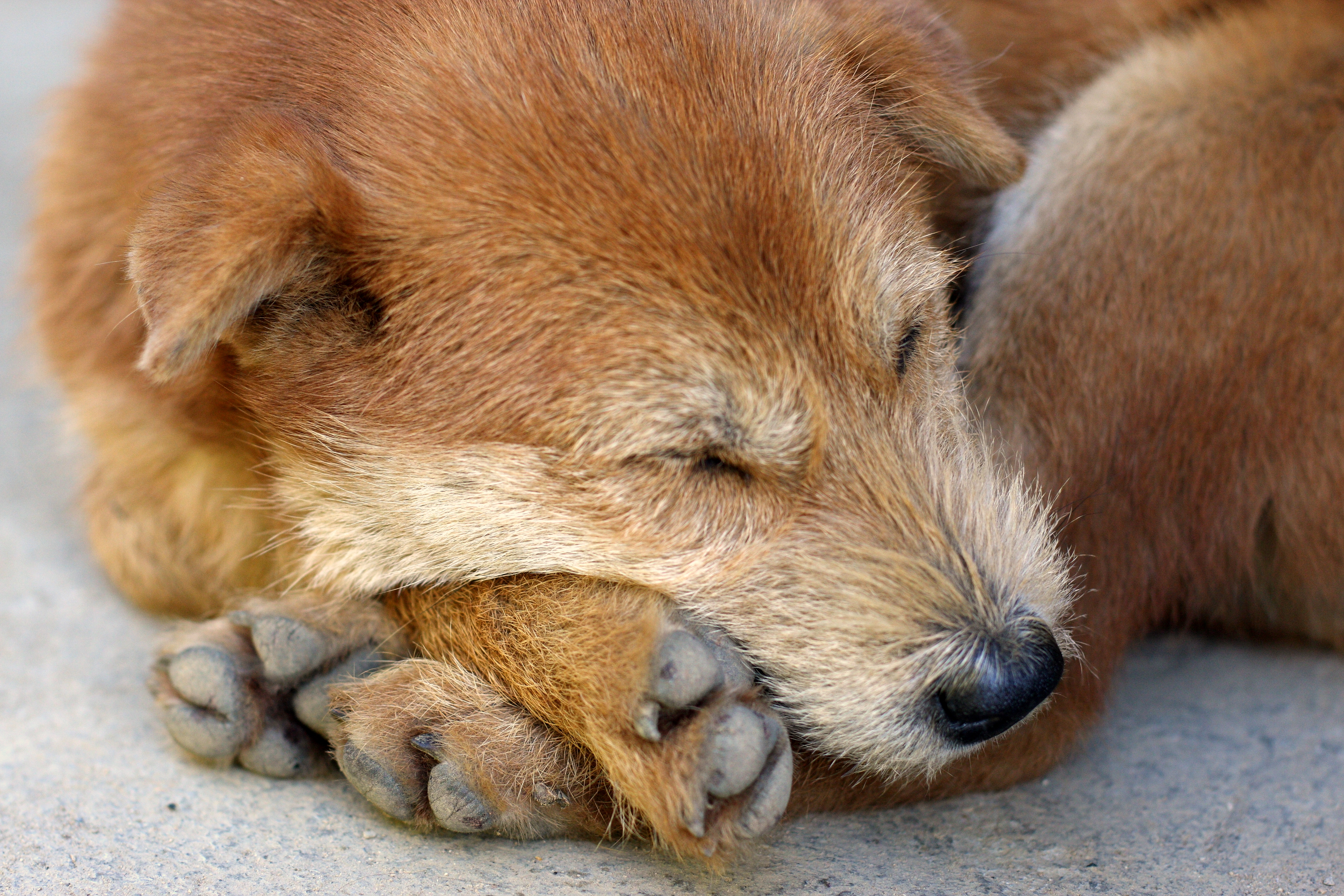 Sapa, Vietnam